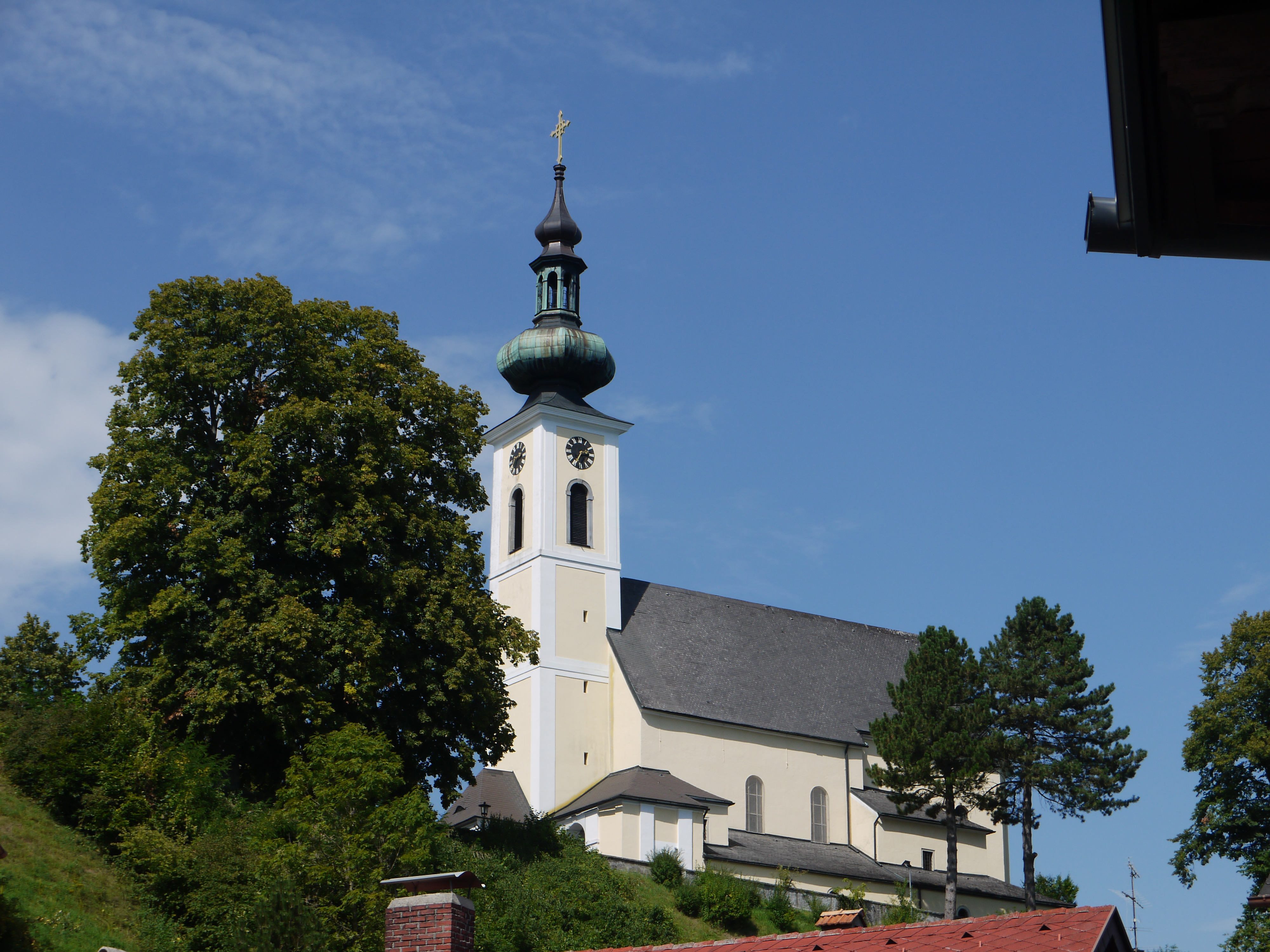 Kath. Pfarrkirche Mariä Himmelfahrt